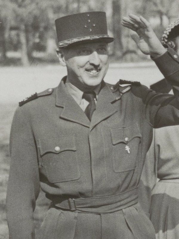 CollectieCollectie Fotoburo de BoerInventarisnummerNL-HlmNHA_54004047BeschrijvingBezoek van de Franse generaal J.P. Koenig aan de Stormschool Bloemendaal.FotonummerNL-HlmNHA_1478_0313DocumenttypeTopografische prenten, tekeningen en foto'sVervaardigerBoer, Cees de (1918-1985) Soort vervaardigerFotograaf PersonenKoenig, J.P. Functies personengeneraal LandNederland ProvincieNoord-Holland GemeenteBloemendaal PlaatsBloemendaal StraatDonkerelaan Begindatum1948Einddatum1948TechniekFoto TrefwoordenMilitairen